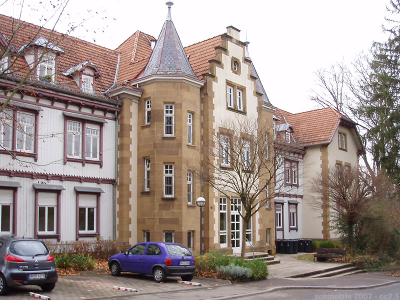 Katharinenspital in der Arndtstraße in Heilbronn, gestiftet von Louis Link